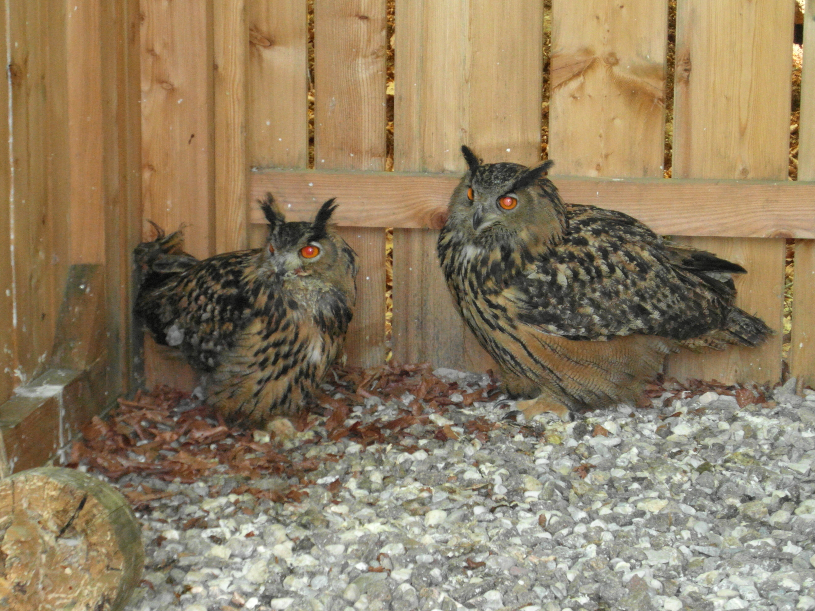 Gufo reale presso il parco faunistico di Spormaggiore